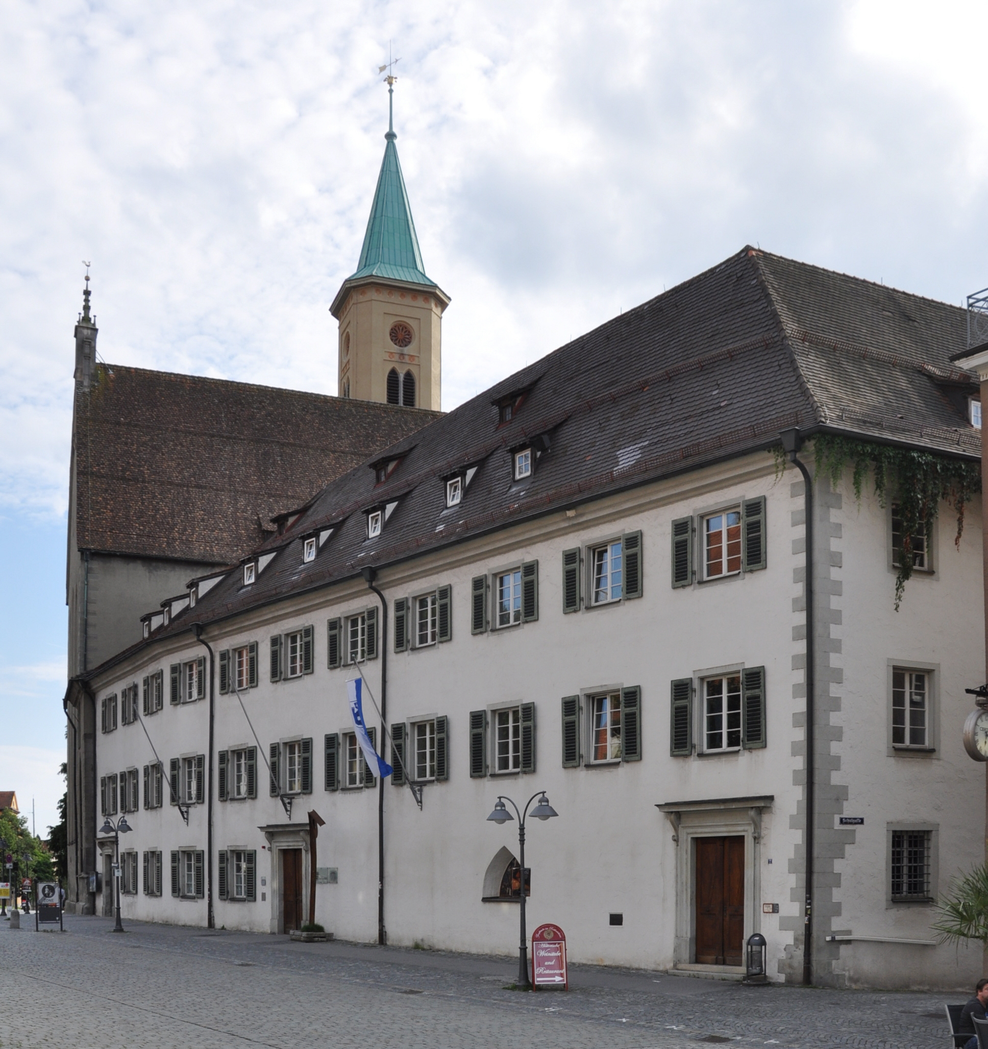 Ravensburg, Marienplatz, Landgericht (ehemaliges Karmeliterkloster) und Evangelische Stadtkirche (ehemalige Klosterkirche)